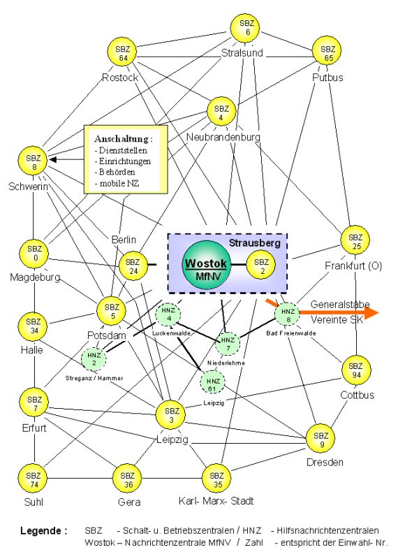 Darstellung der oberen Netzebene des Integrierten Stabsnetzes / Sondernetzes 1